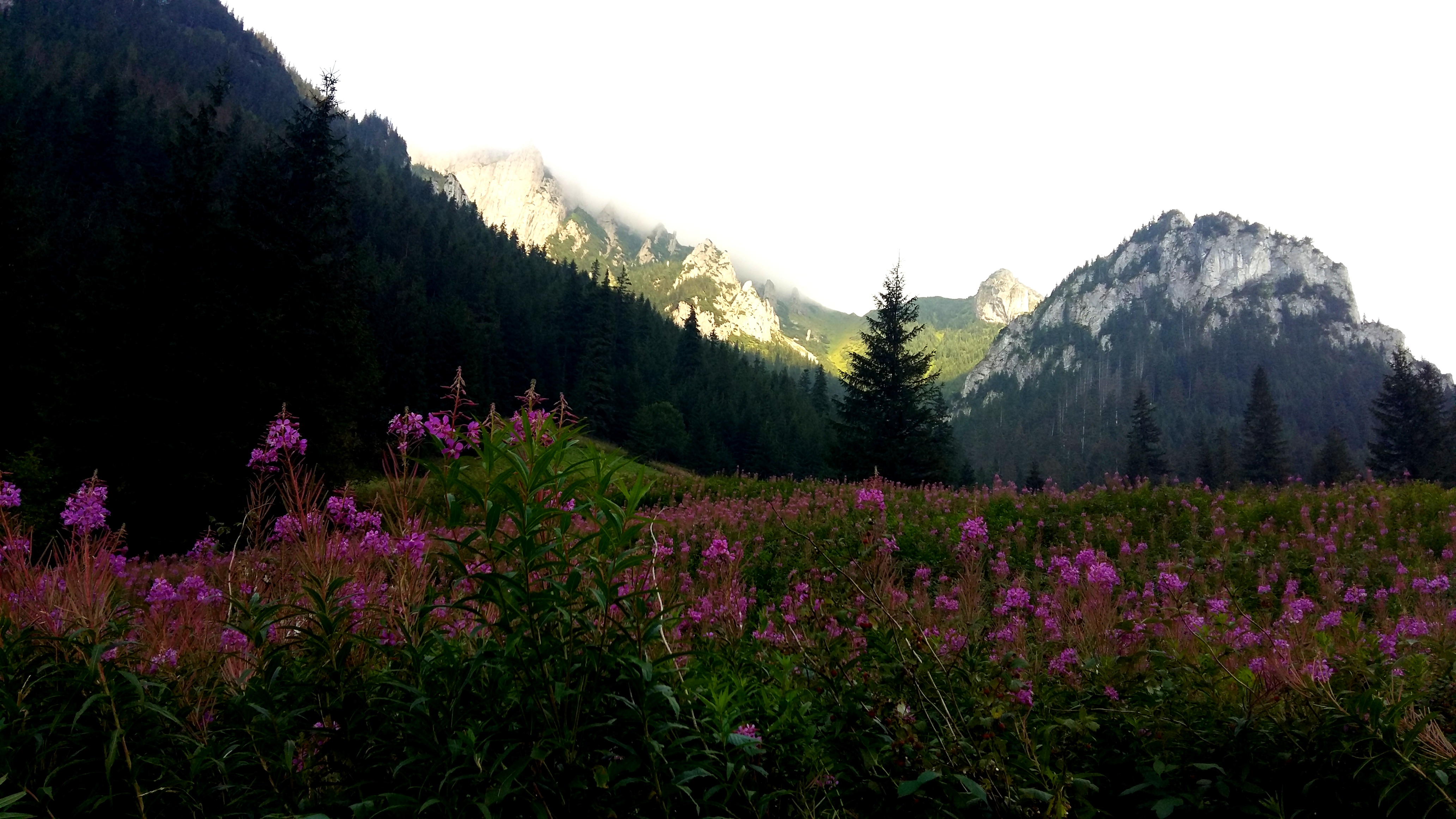 Park narodowy: Tatrzański Park Narodowy This is a photography of protected area with CRFOP ID PL.ZIPOP.1393.PN.14